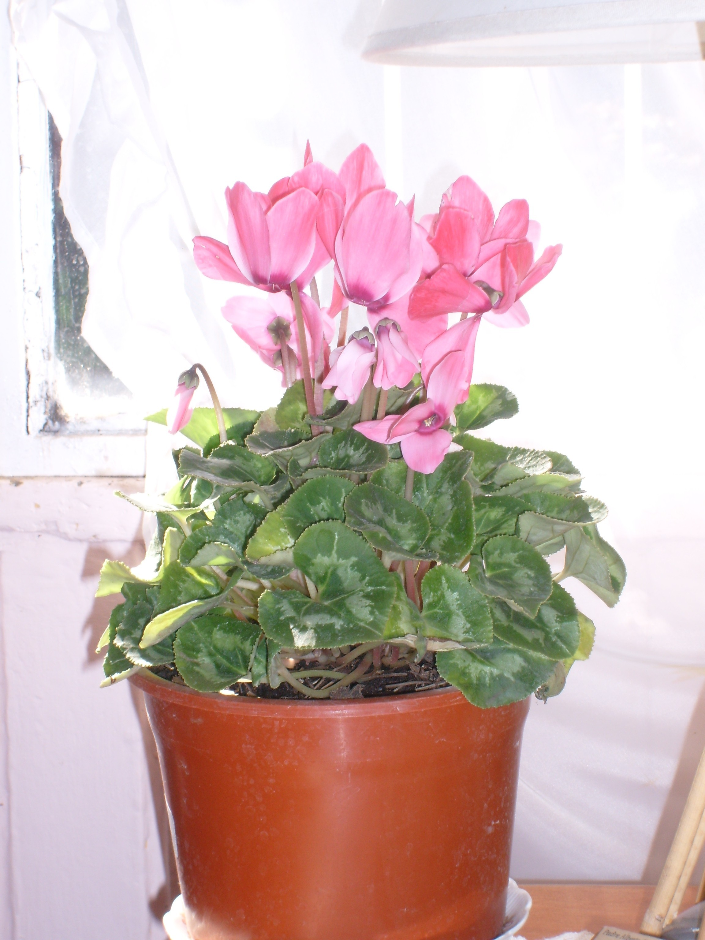 Cyclamen, pot ornamental